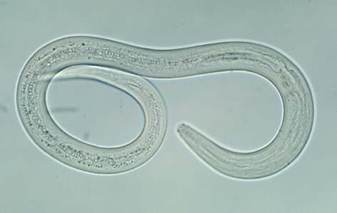 Ancylostoma duodenale